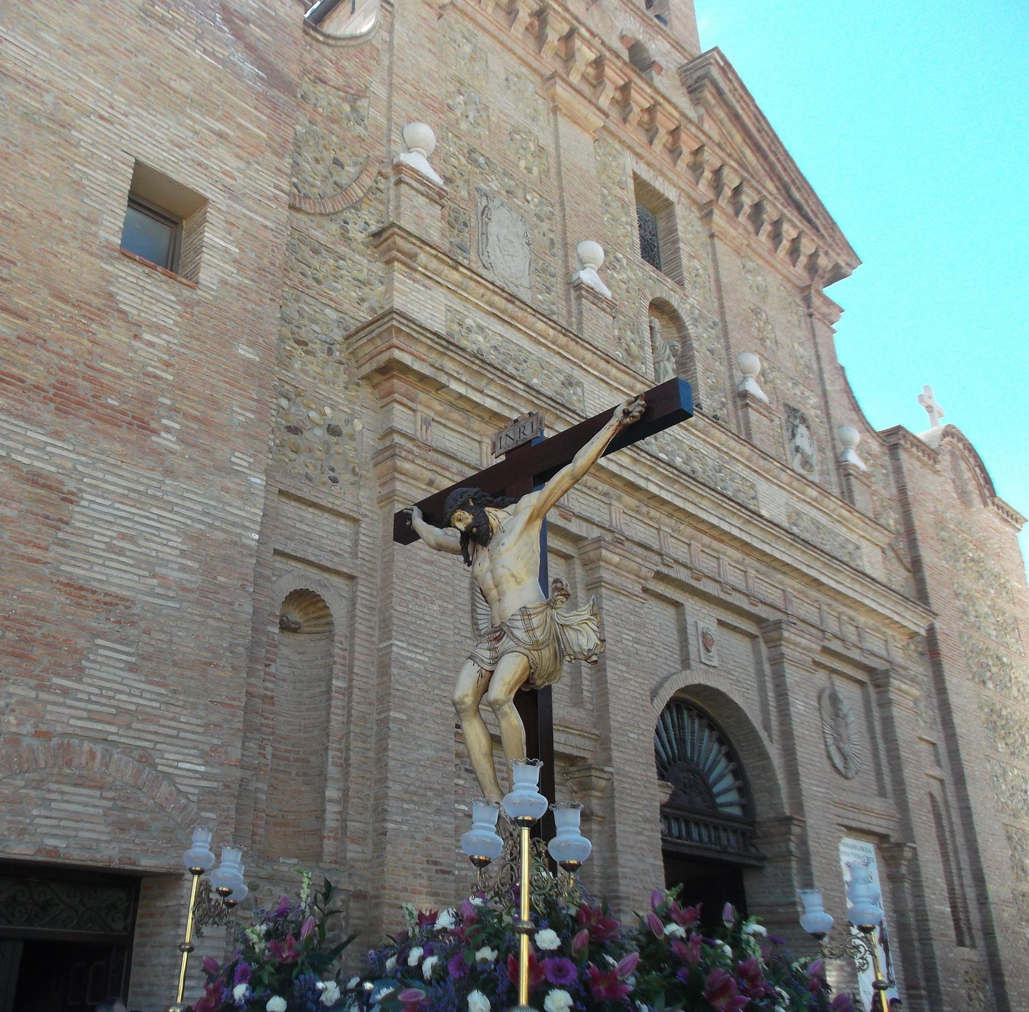 Calagurritana Semana Santa